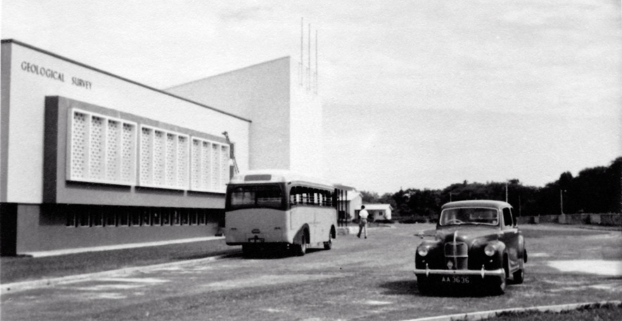 Geological survey building ipoh